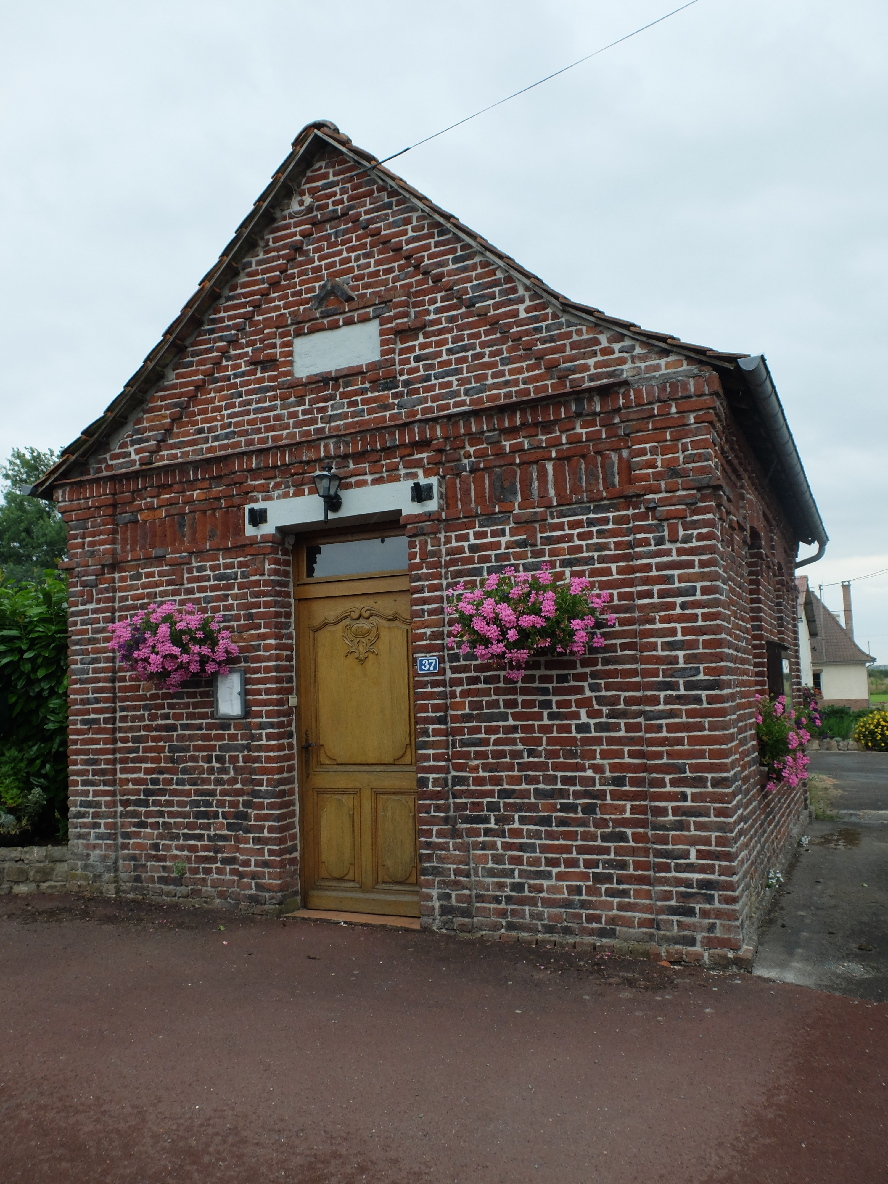 Vue de la mairie de Brévillers (Pas-de-Calais).